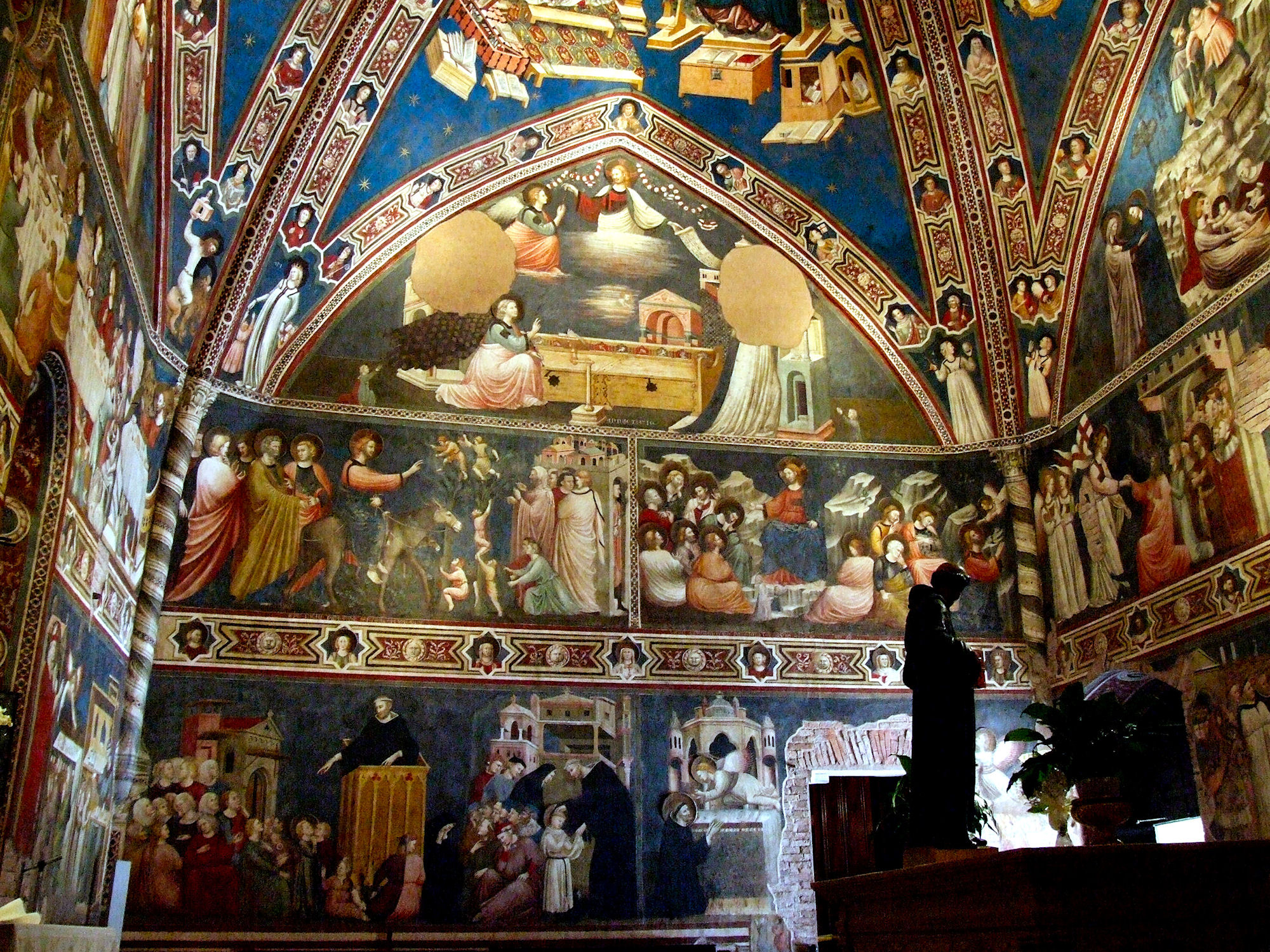 Cappellone di San Nicola Basilica di San Nicola a Tolentino Native nameBasilica di San Nicola da TolentinoLocationTolentino, ItalyCoordinates43° 12′ 28″ N, 13° 17′ 06″ E Established14th-17th centuriesWeb page control : Q3635709 VIAF: 129156352 GND: 1087192536